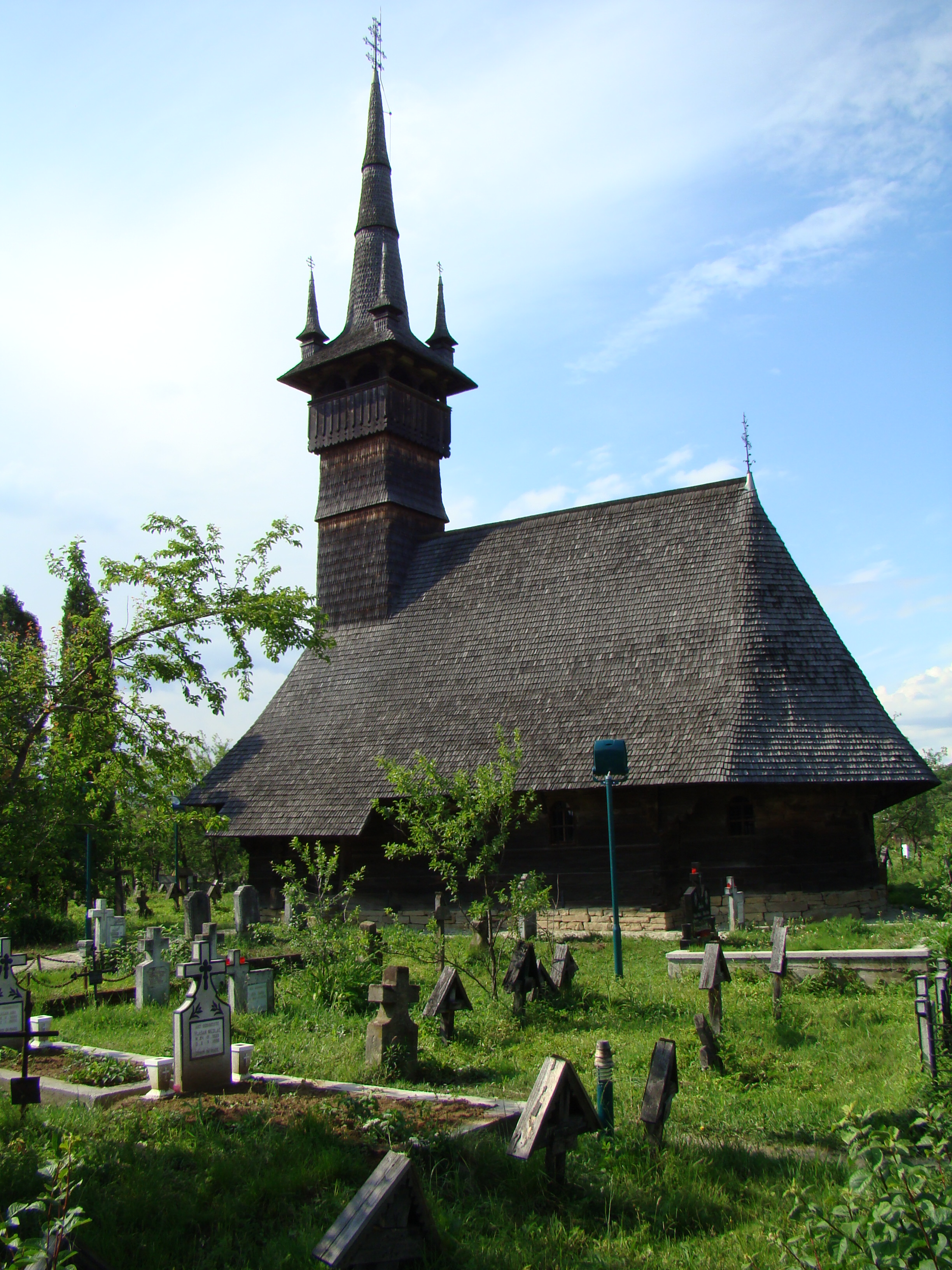 Biserica de lemn Sf.Arhangheli Rogoz